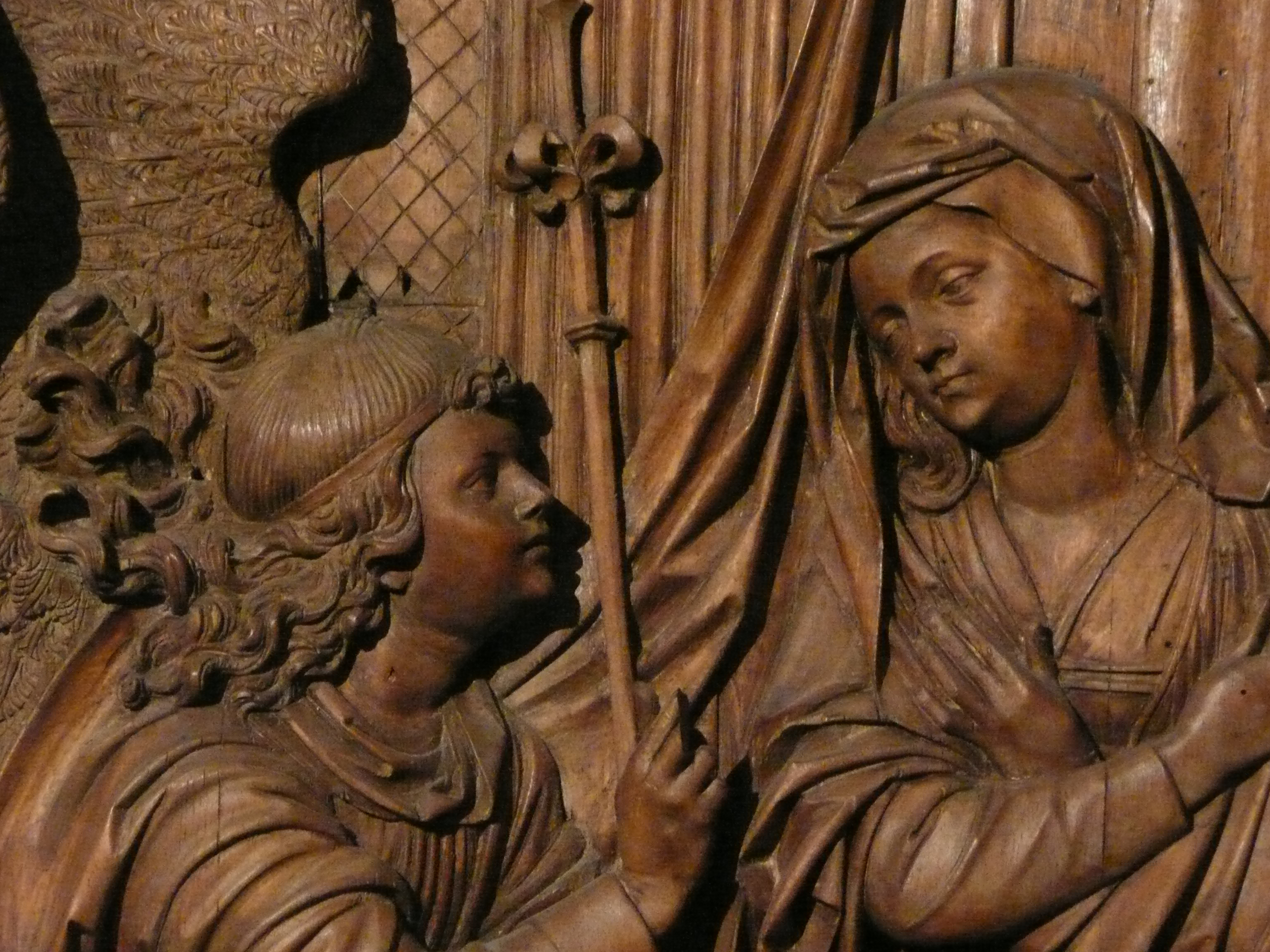 Détail du retable de Bergheim, Musée Unterlinden de Colmar